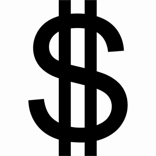 Logo du sigle dollar avec les deux colonnes d'Hercule verticales